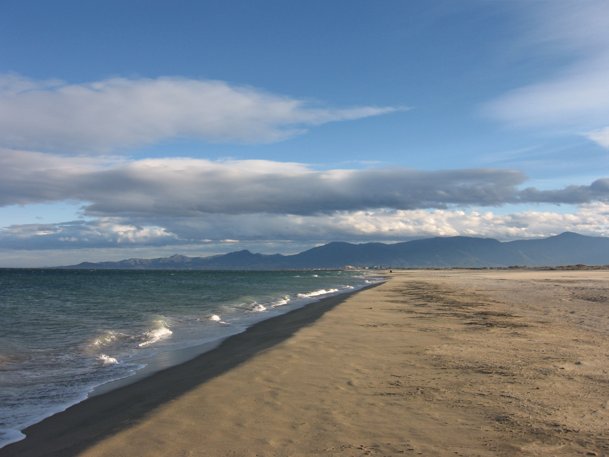 Canet-Plage